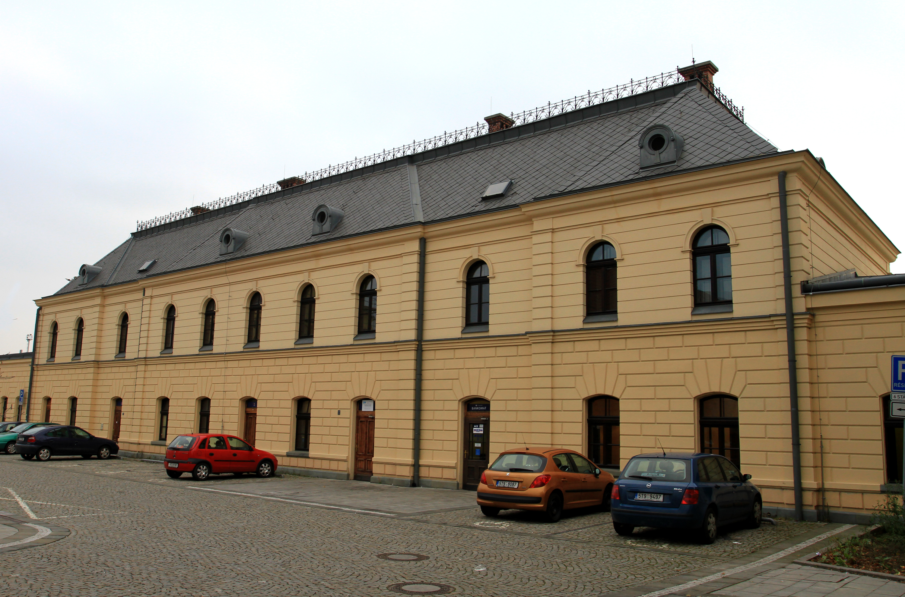 Železniční stanice, z toho jen: výpravní budova (Ostrava), Svinov, Peterkova 79, Ostrava